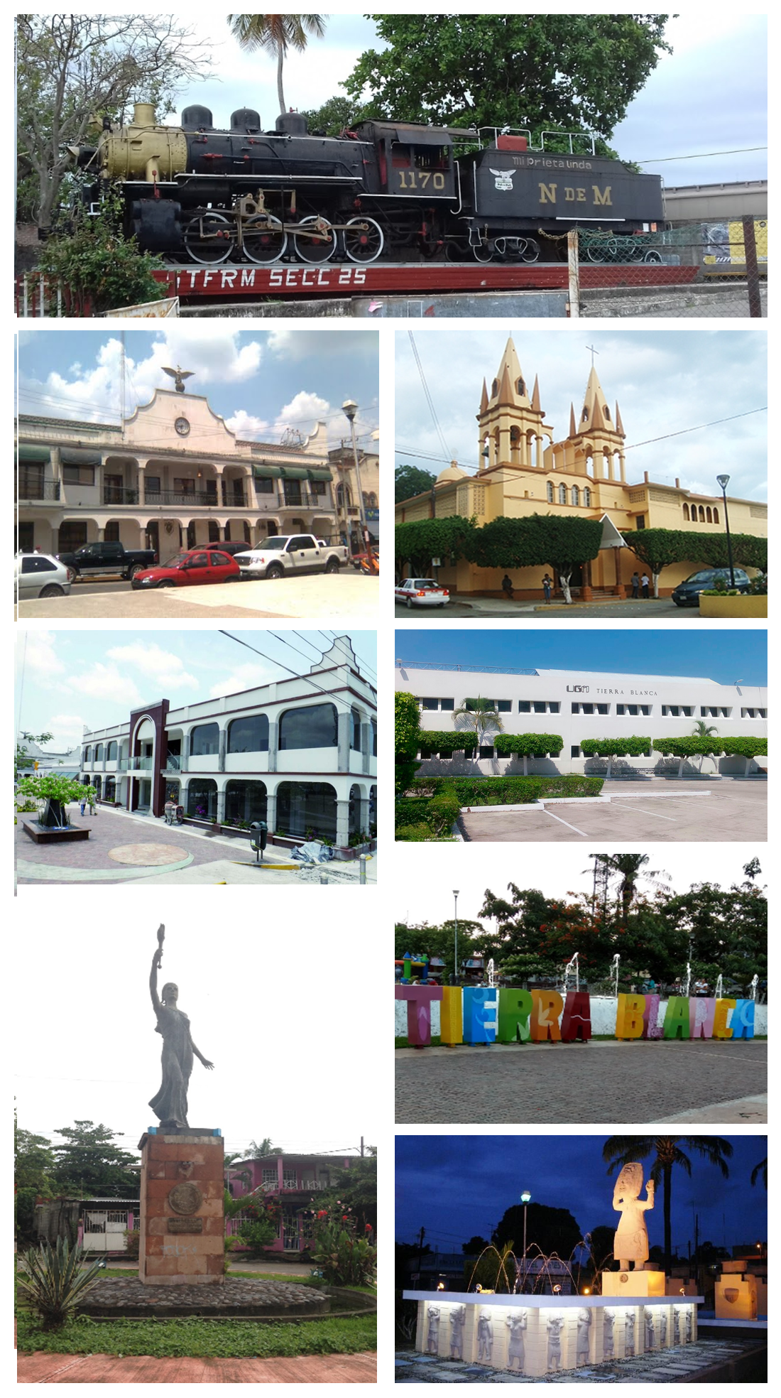 Collage de la ciudad de Tierra Blanca, Veracruz